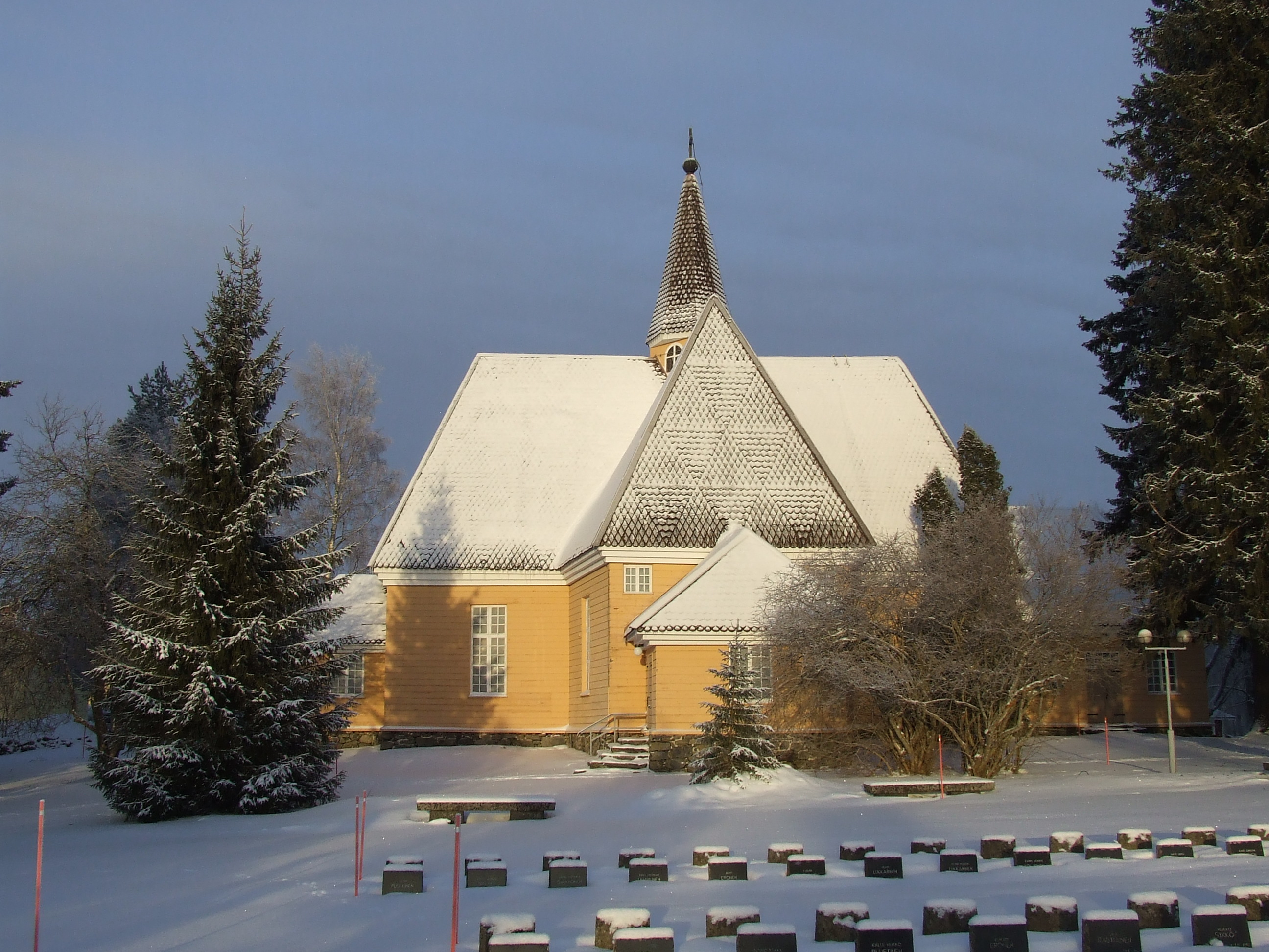 Kiihtelysvaaran kirkko Joensuussa